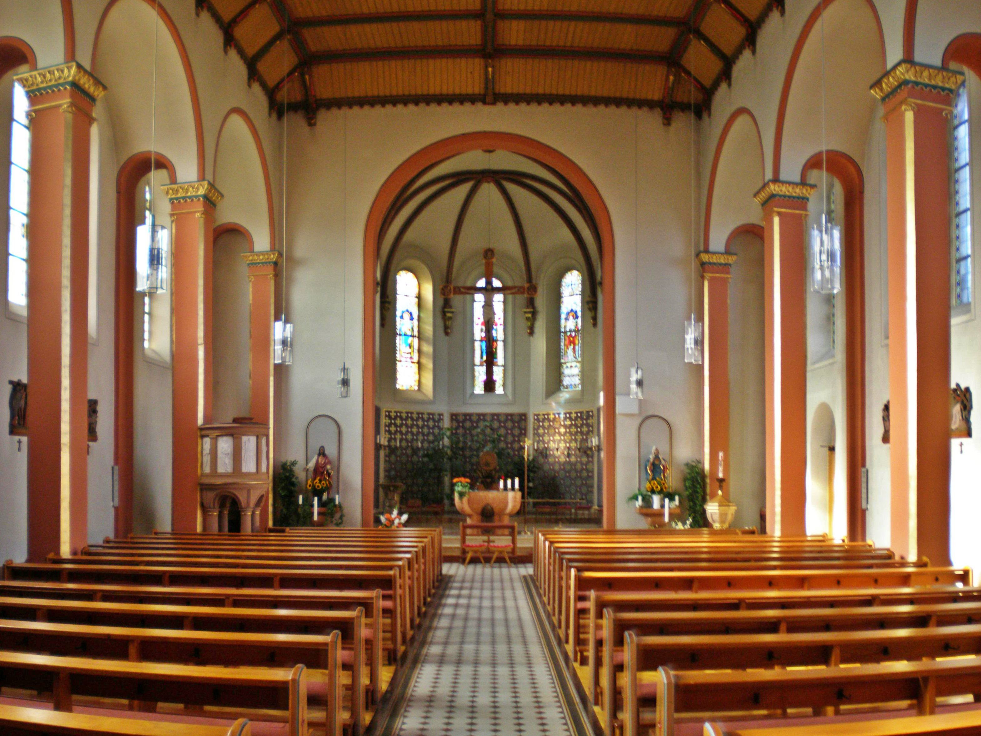 Kath. Kirche in Rohrbach (Saar)